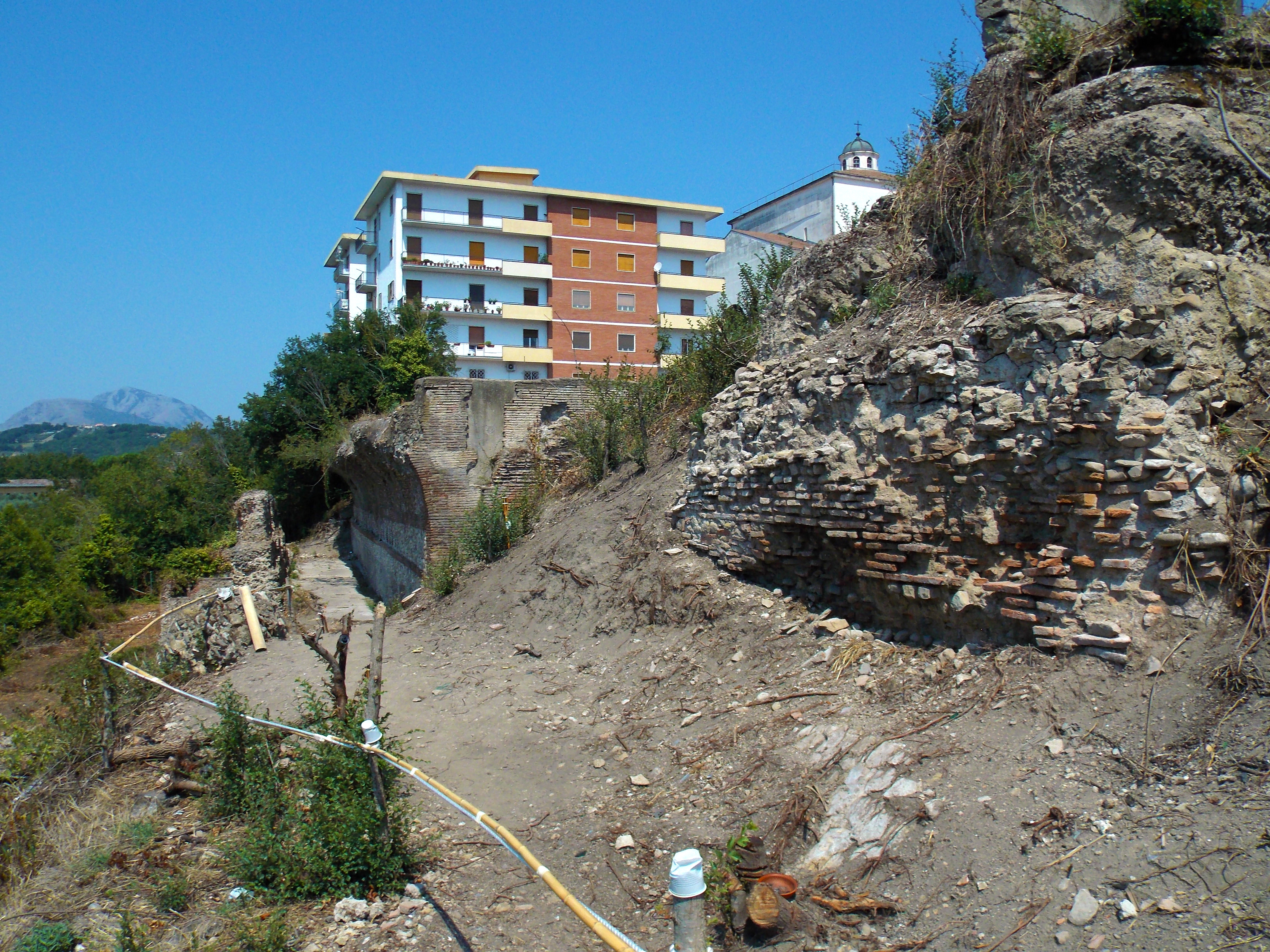 Criptoportico dei Santi Quaranta a Benevento. Vista del corridoio longitudinale dall'estremità est